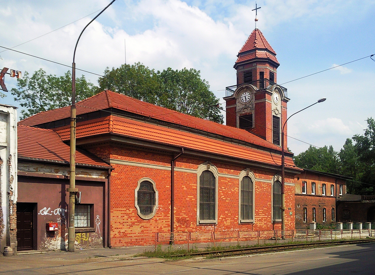 Kościół Ewangelicko-Augsburski w Sosnowcu przy ulicy Żeromskiego